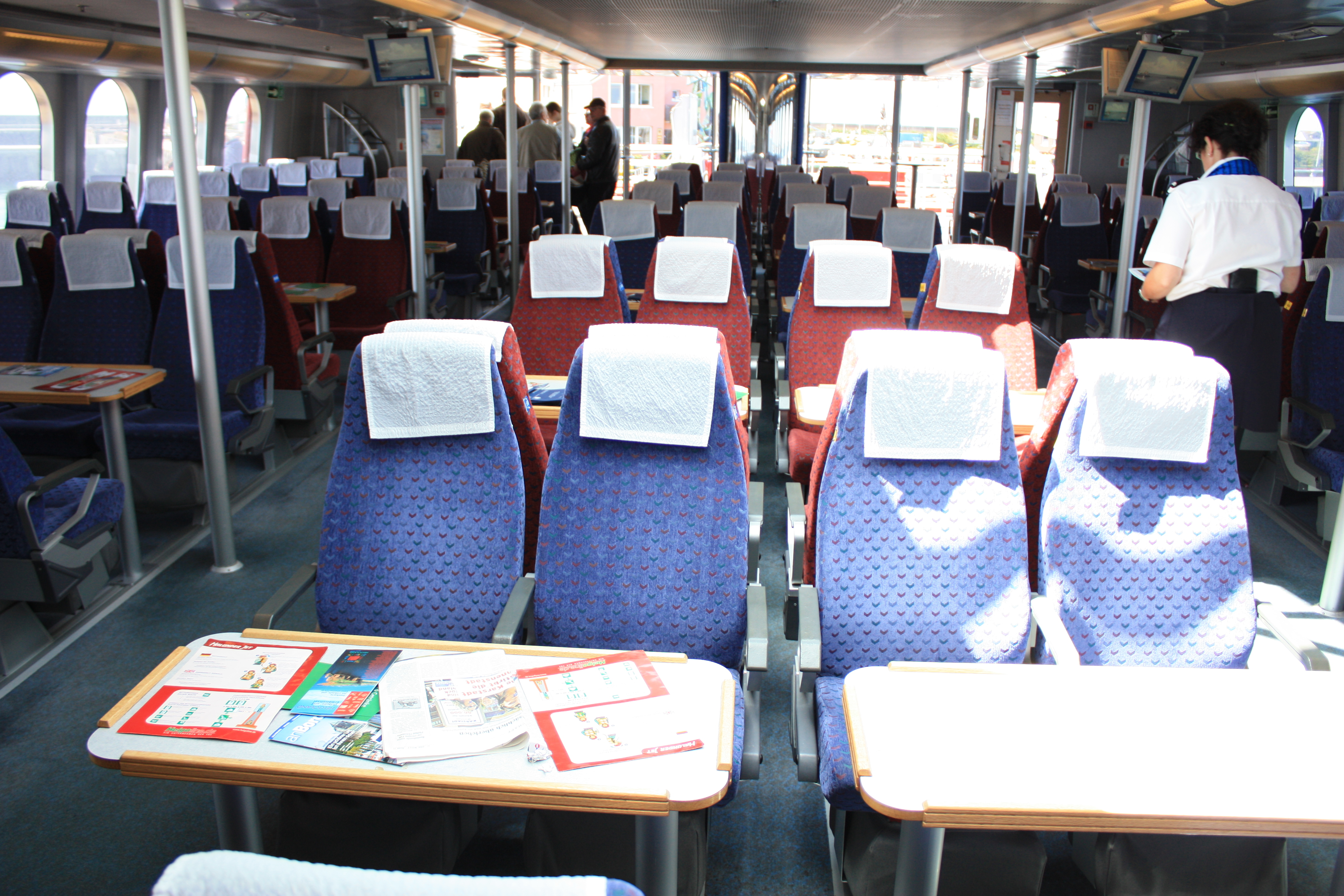 Halunder Jet